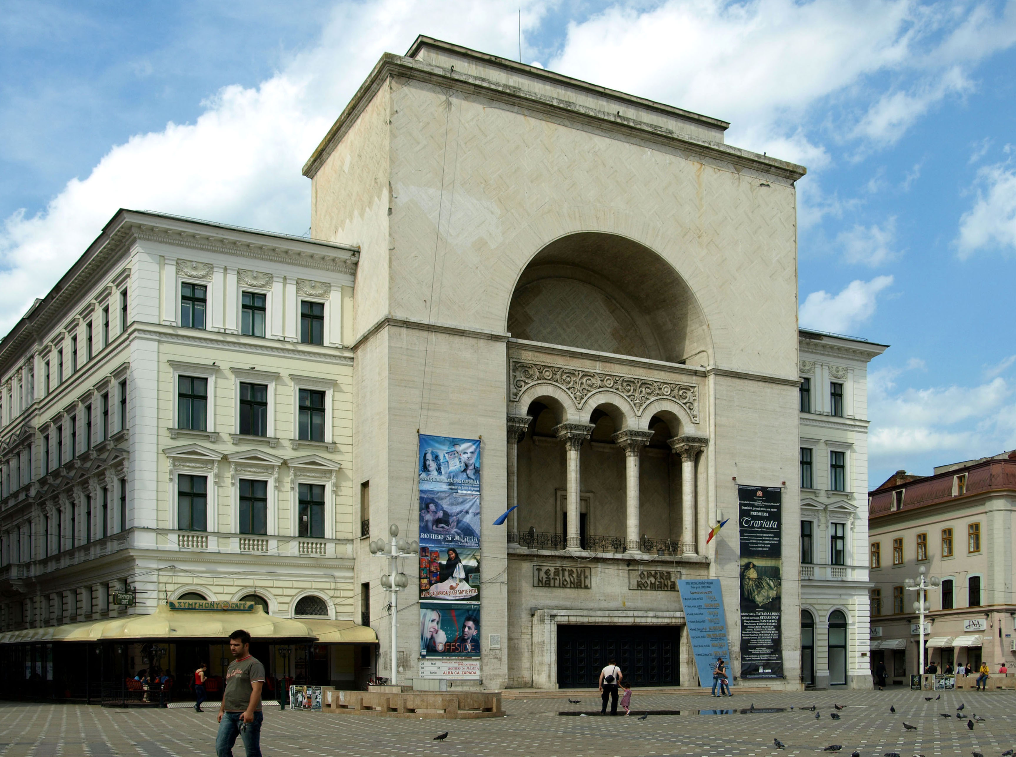 Opera din Timișoara și Teatrul Național